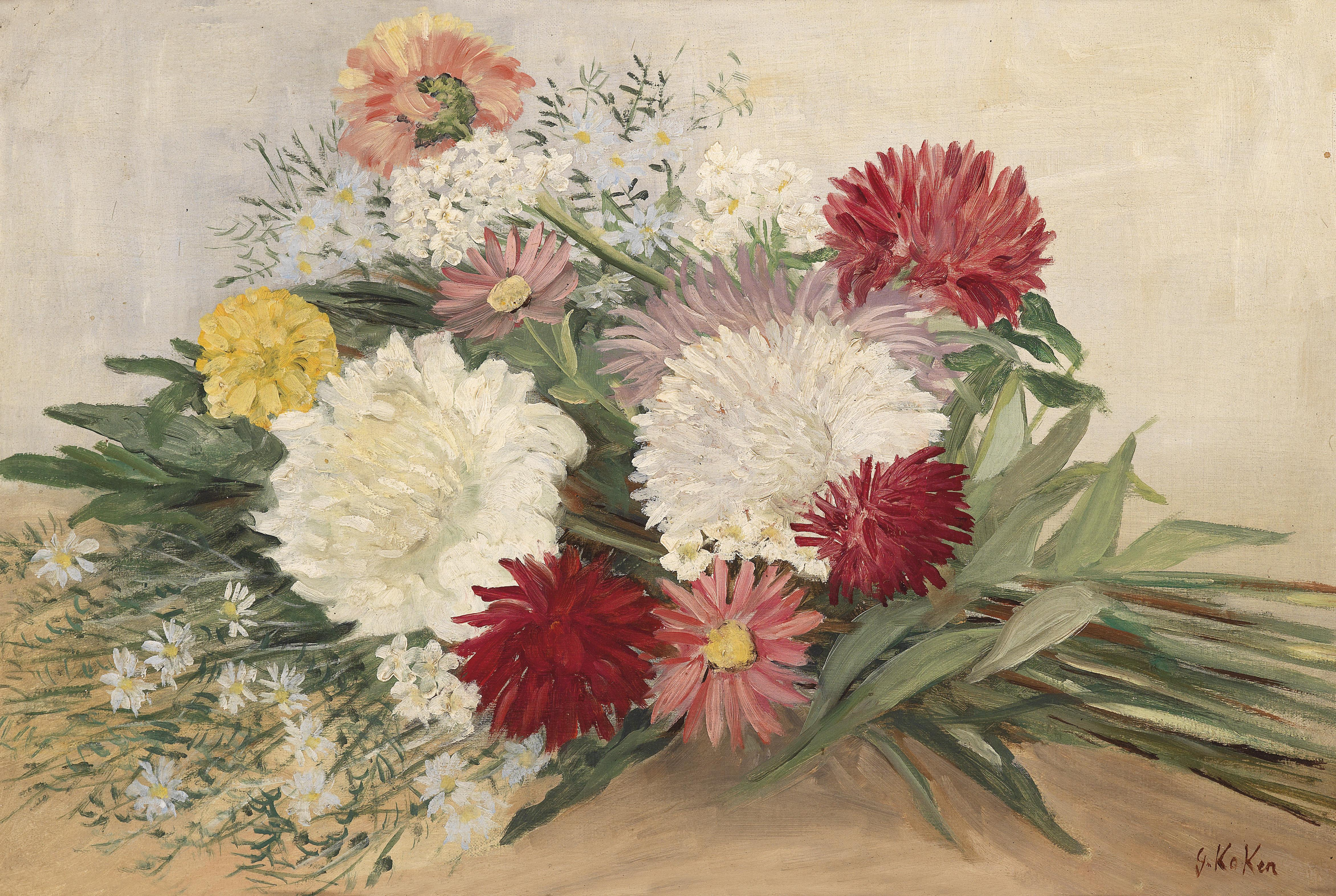 Chrysanthemen, signiert G. Koken, Öl auf Leinwand, 40 x 60 cm